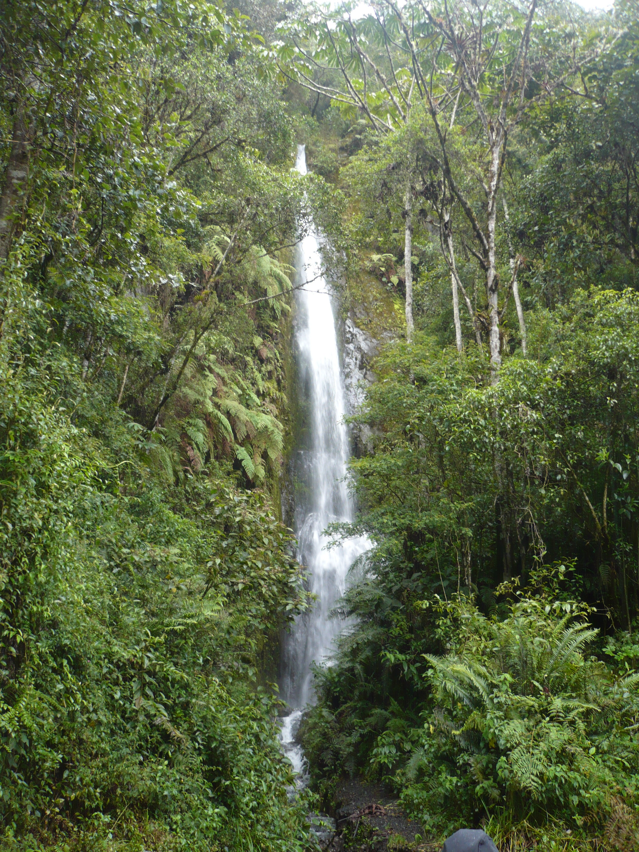 Cascada en el bosque nublado en el Parque Nacional del Manu.